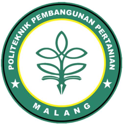 Logo Polbangtan Malang